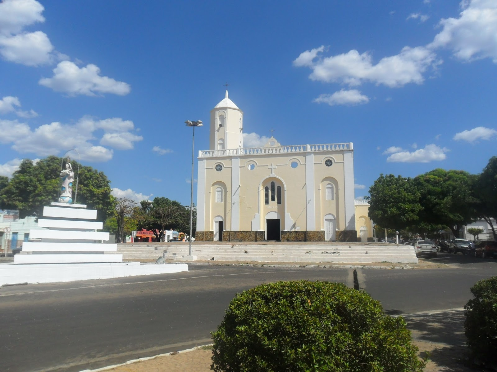 Igreja matriz de Valença do Piauí. 300 anos de devoção.